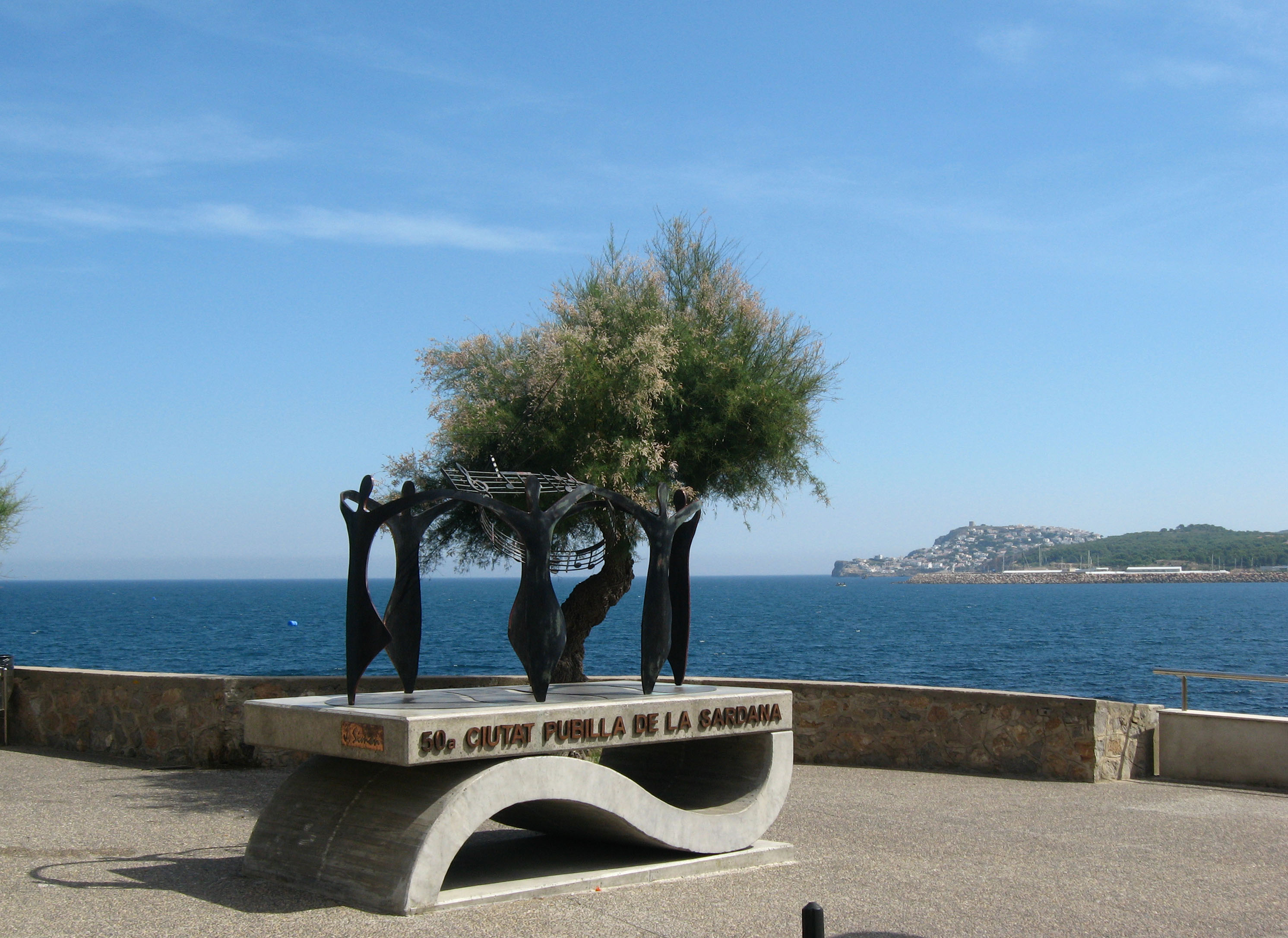 Sardana-Skulptur in L’Escala Datum: 15.09.2010 Urheber: Michael Pfeiffer alias Benutzer:Gordito1869 Quelle: privates Fotoalbum des Urhebers